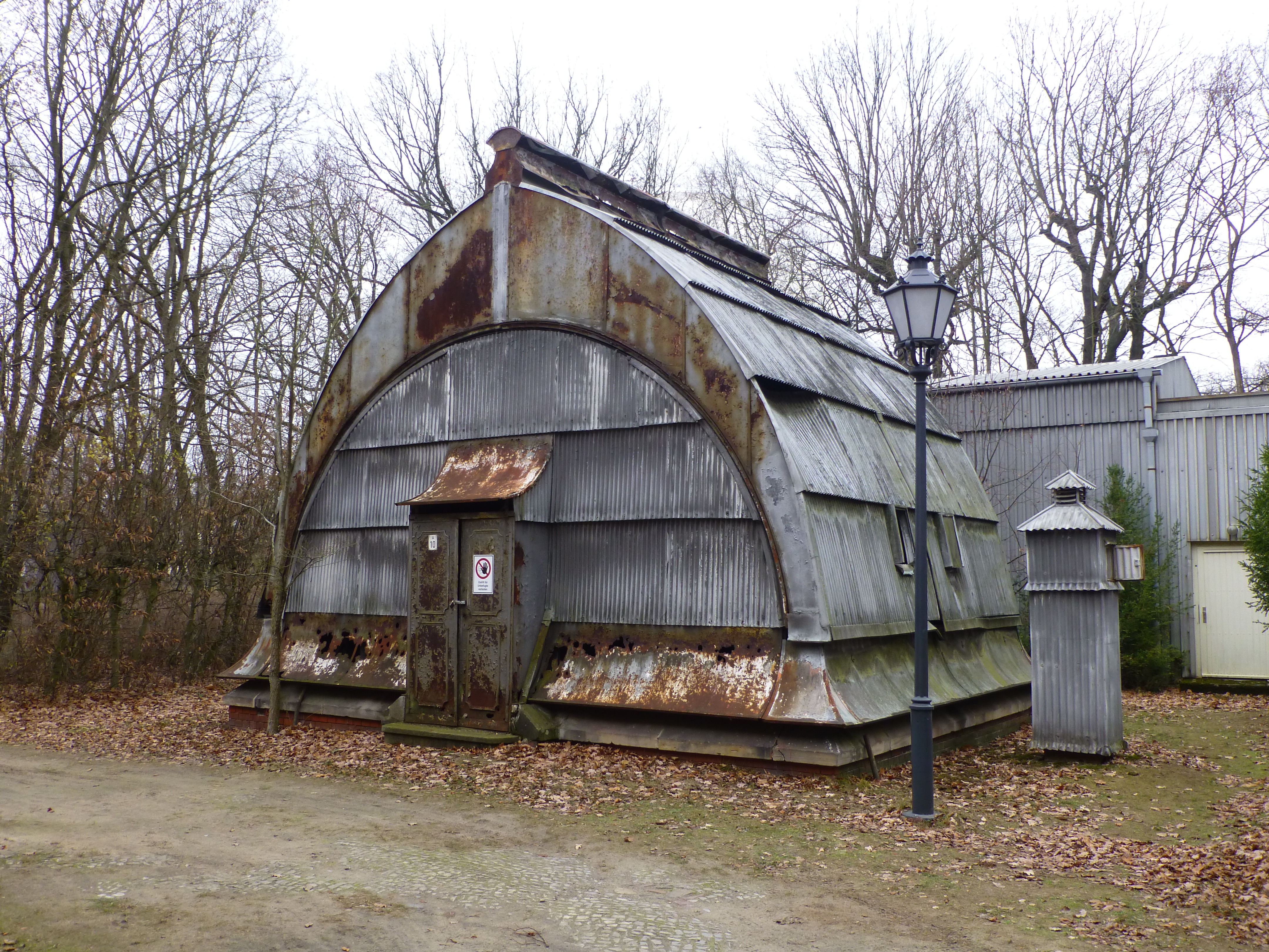 Meridianhaus unweit vom Helmertturm auf dem Telegrafenberg in Potsdam